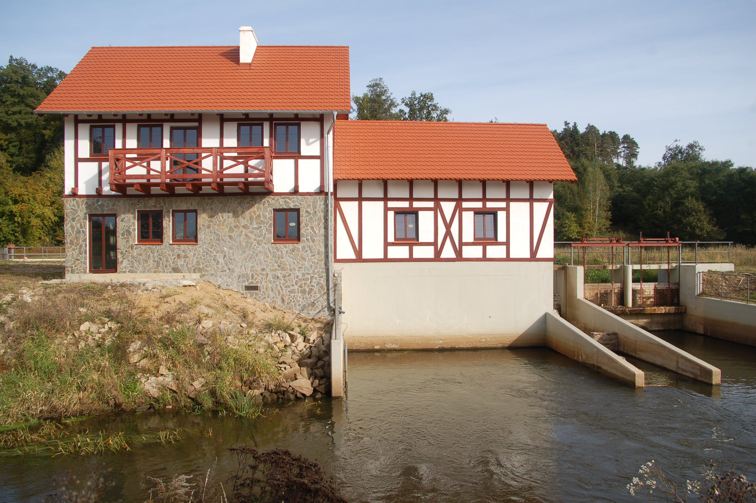 Elektrownia wodna nad rzeką Szprotawa w Wiechlicach